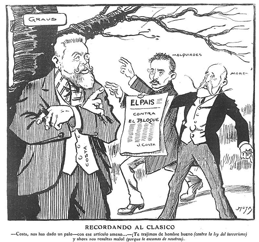 Recordando al clásico, en la revista satírica española Gedeón.